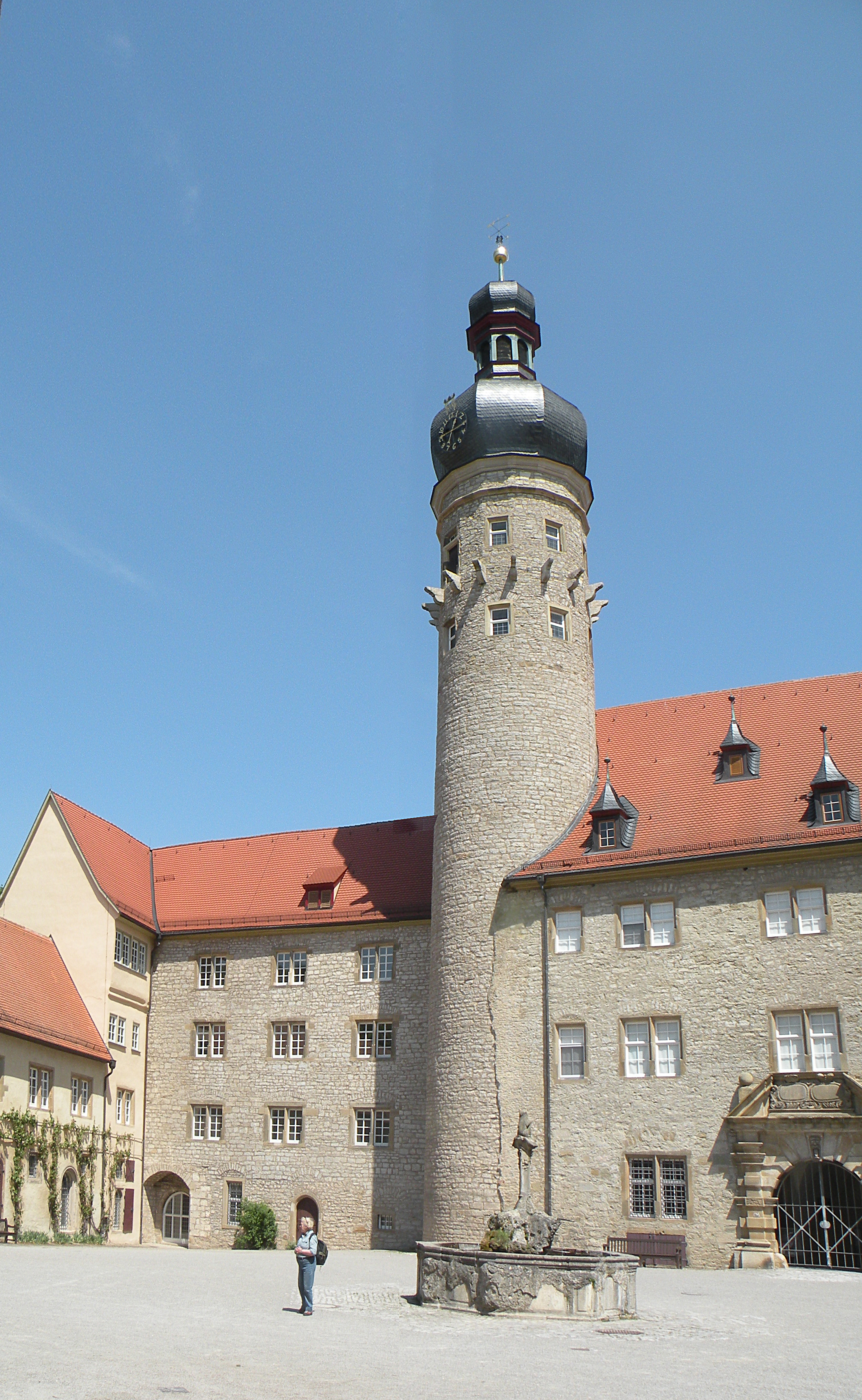 Weikersheim_Castle_Donjon. JPG